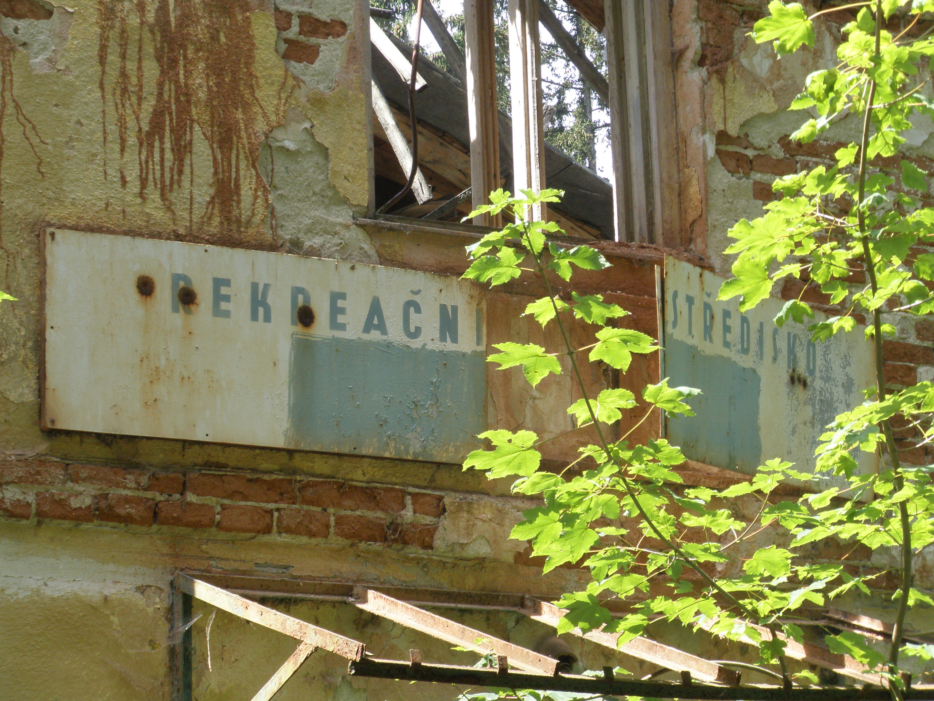 Zbytky zaniklého rekreačního střediska u Velké Roudky